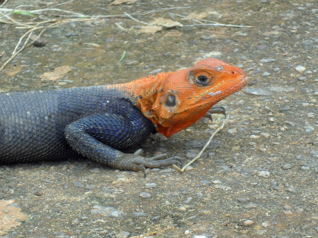 Lézard du Cameroun (Agama africana), dans le département du Nyong-et-Kéllé (région du Centre)